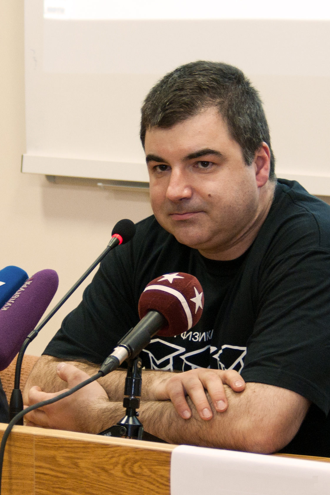 Константин Сергеевич Новосёлов, выпускник МФТИ, нобелевский лауреат по физике 2010 года.